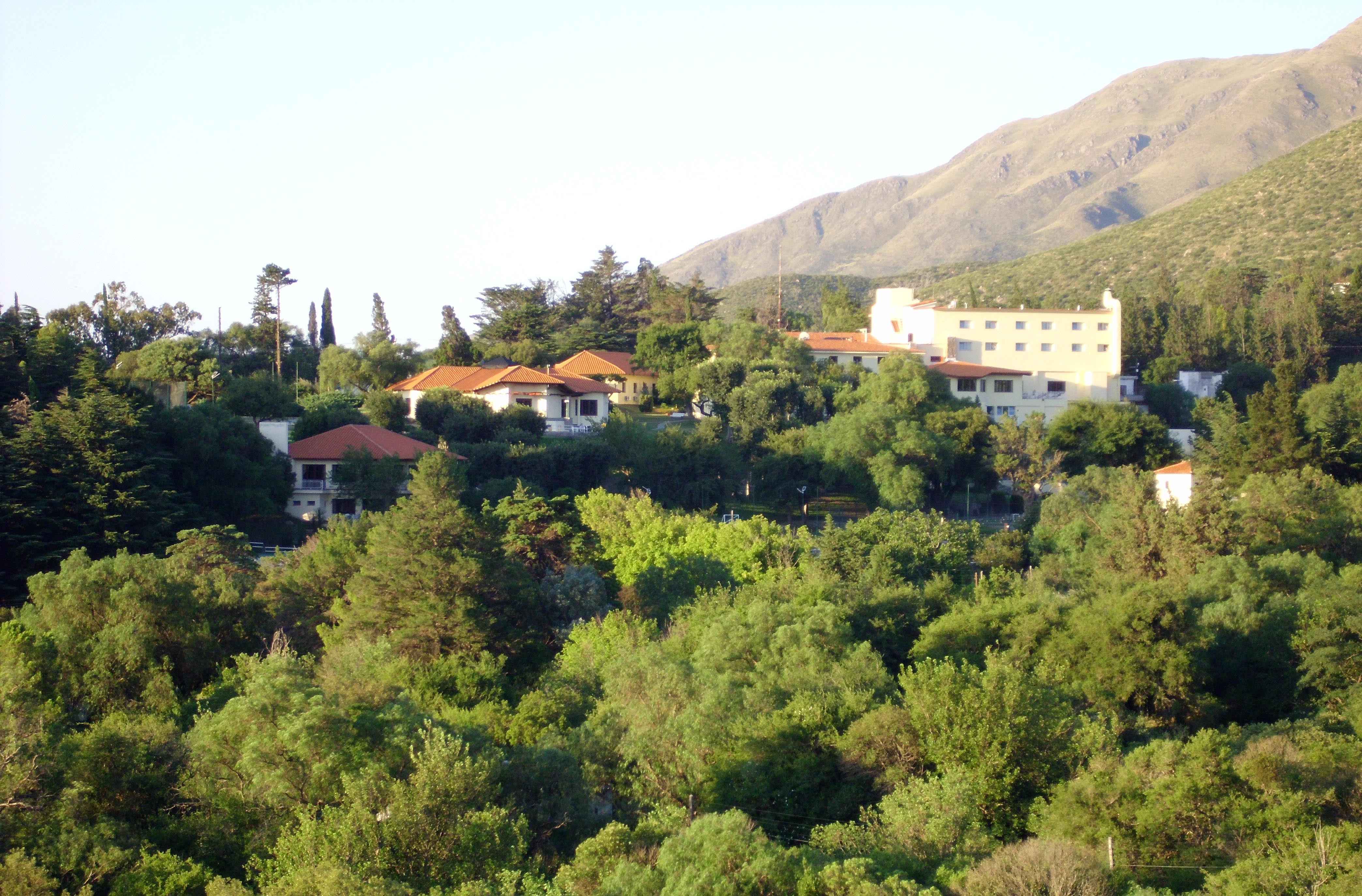 Imagen de la localidad de los cocos con su vegetación.